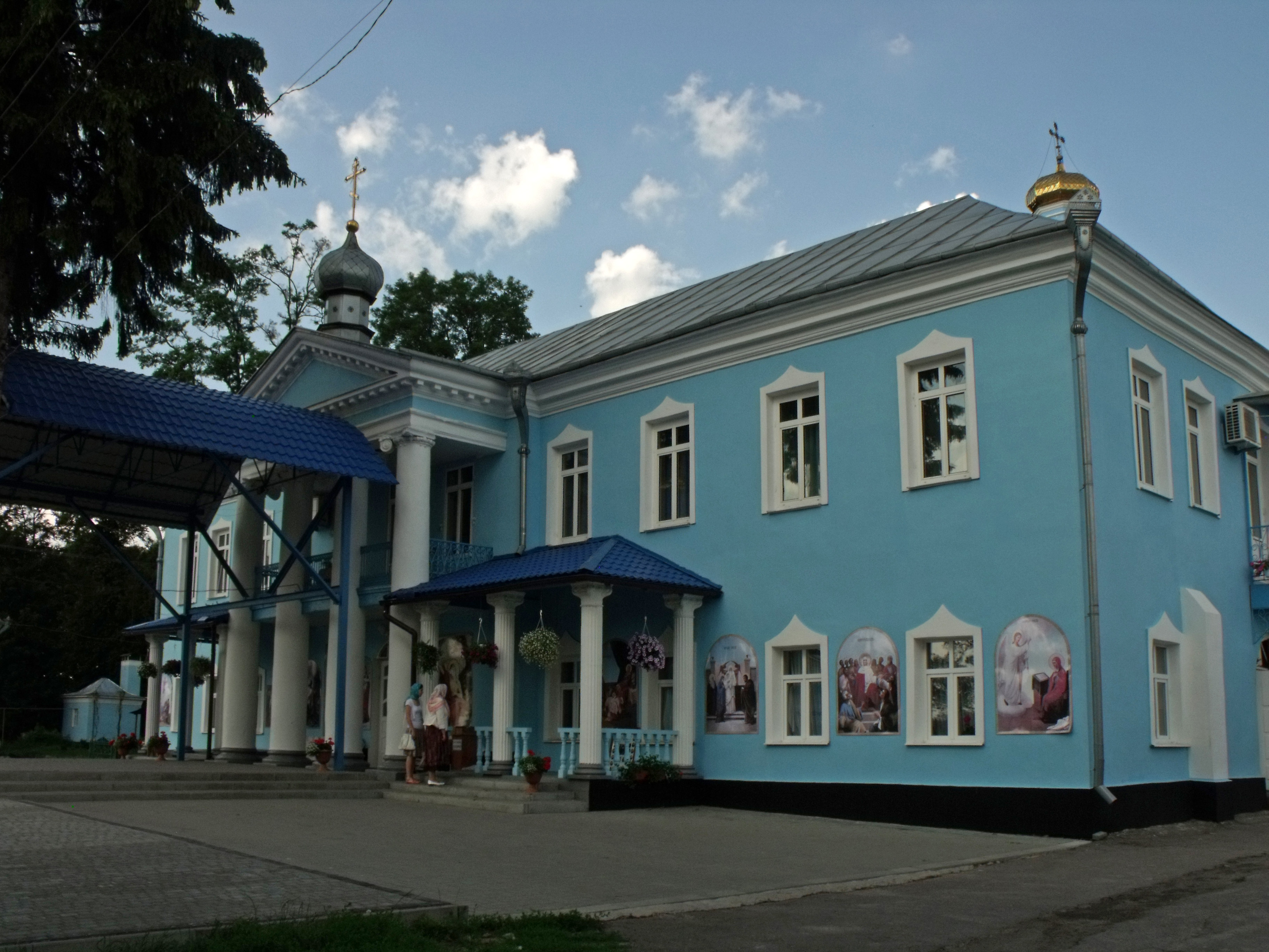 Миколаївська церква: Рівненська область, Рівненський район, с.Городок